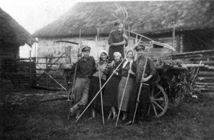 בית"רים בחוות הכשרה ע"י טאלין, אסטוניה